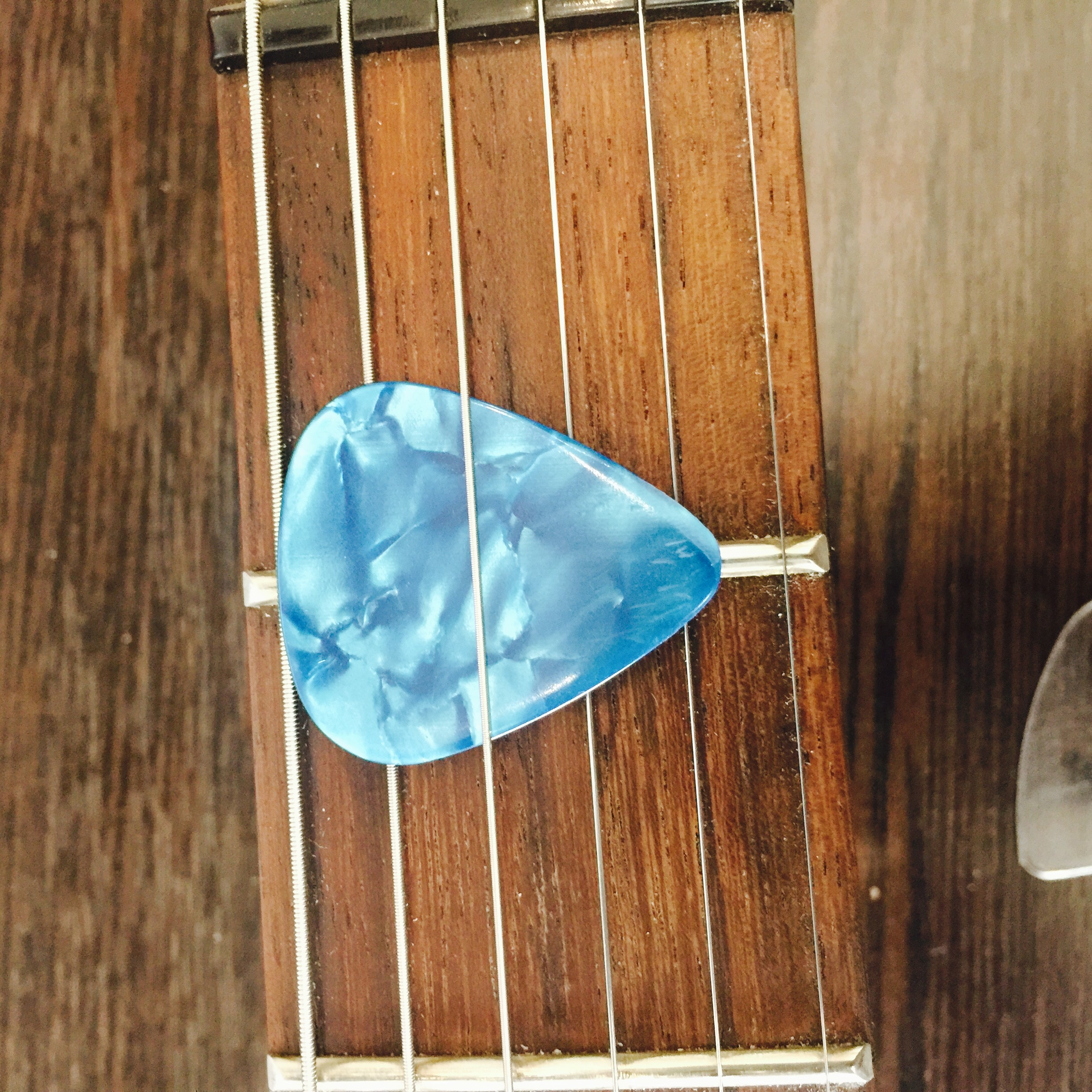 Қазақша (кирил): медиатор